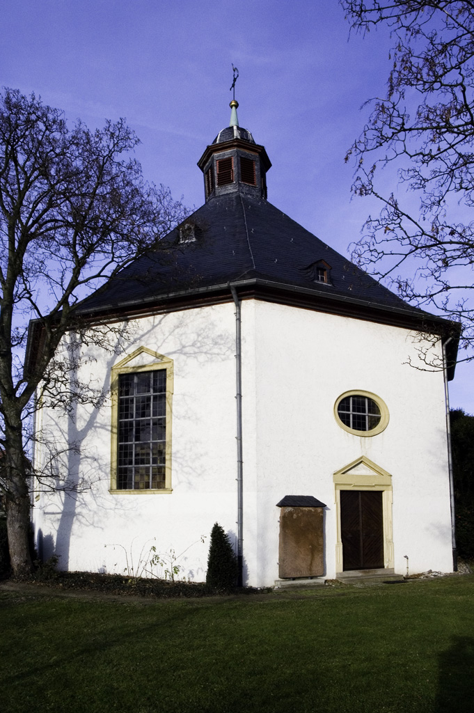 Evangelische Kirche in Uelversheim